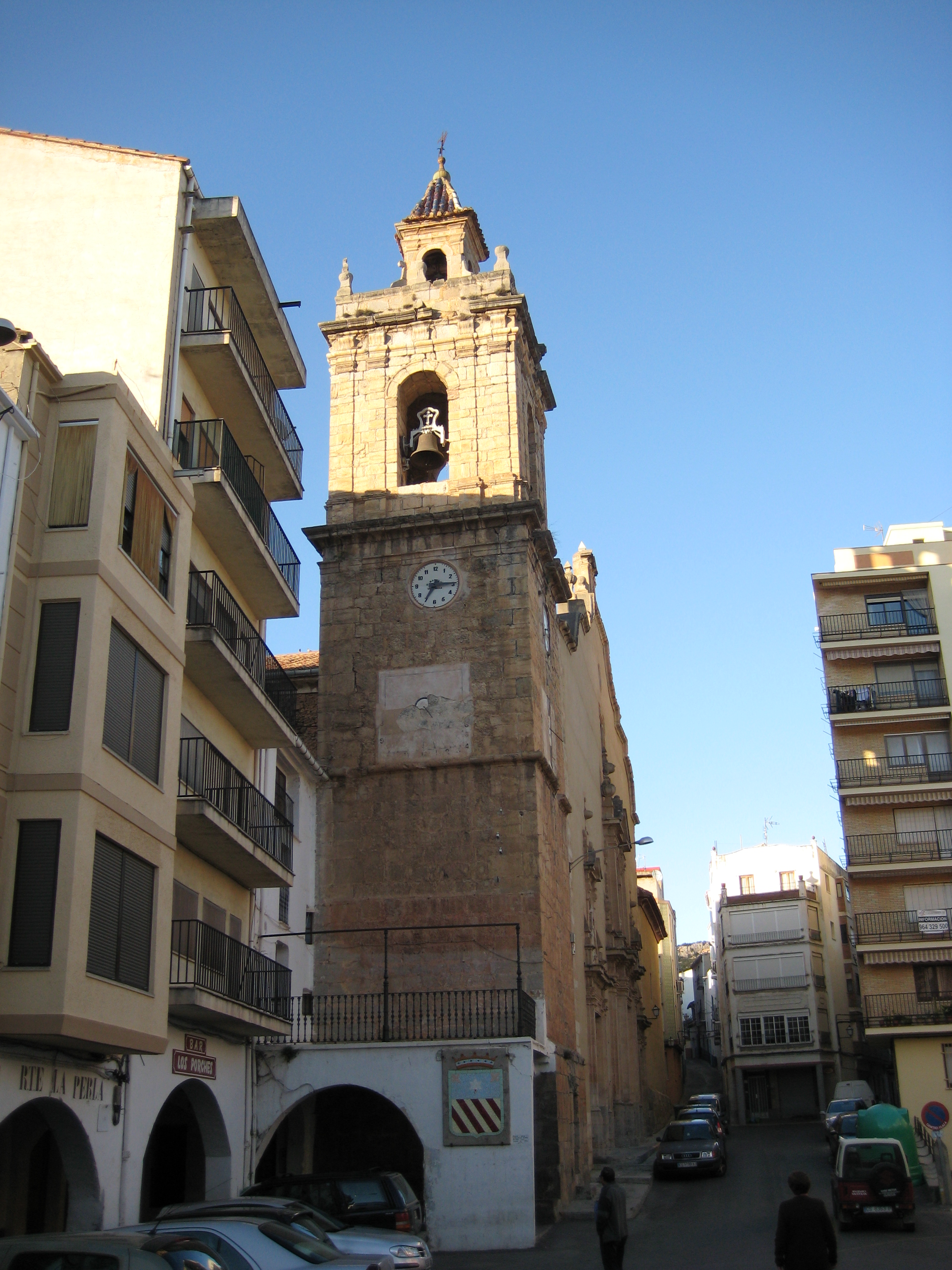 Torre campanar de l'església de l'Assumpció de Llucena (L'Alcalatén)